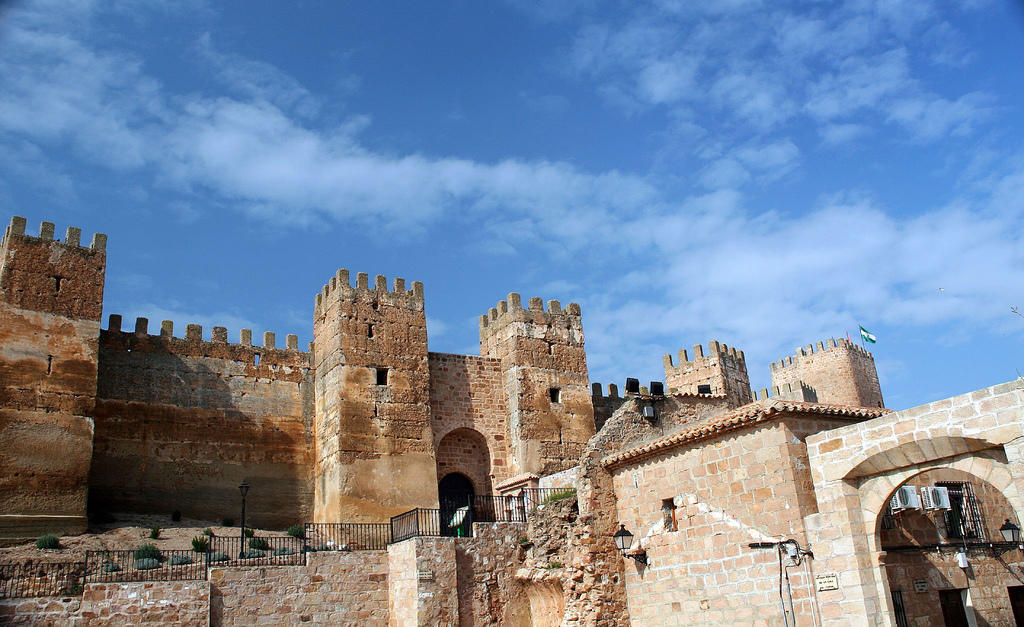 Fachada del castillo de Baños de la Encina, Jaén, Andalucía, España